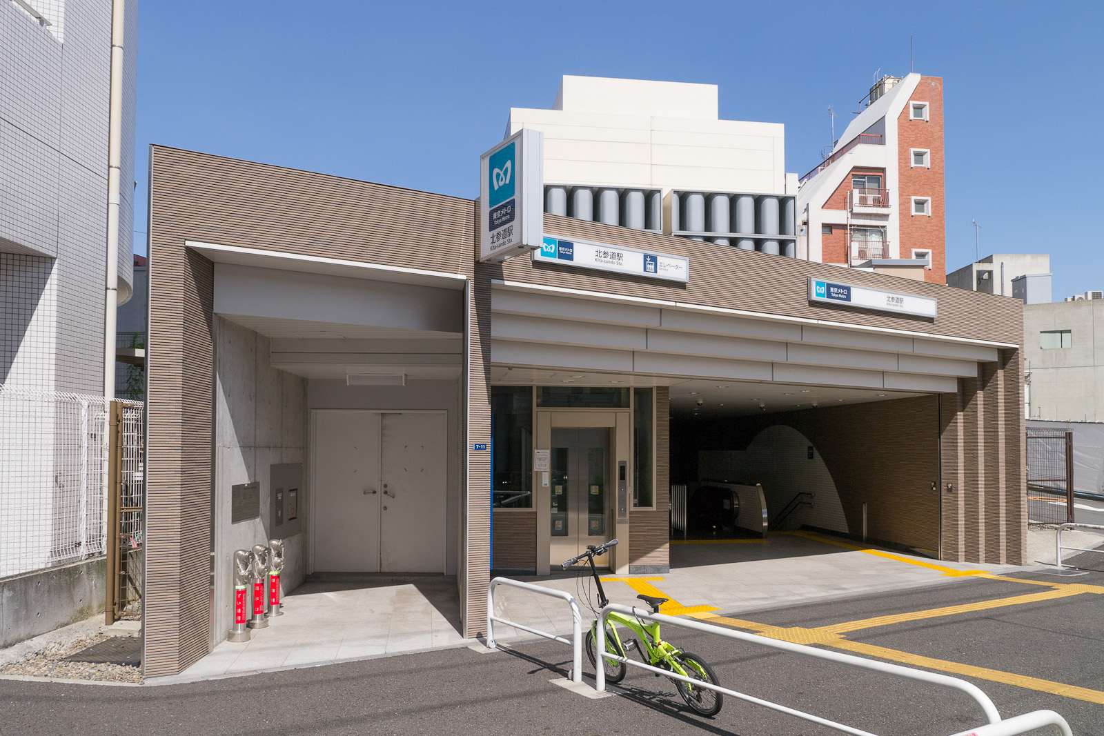 東京メトロ副都心線北参道駅代々木方面出口（出入口1）。